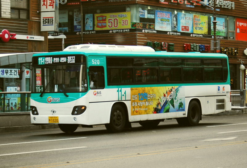 안양시내버스 11번